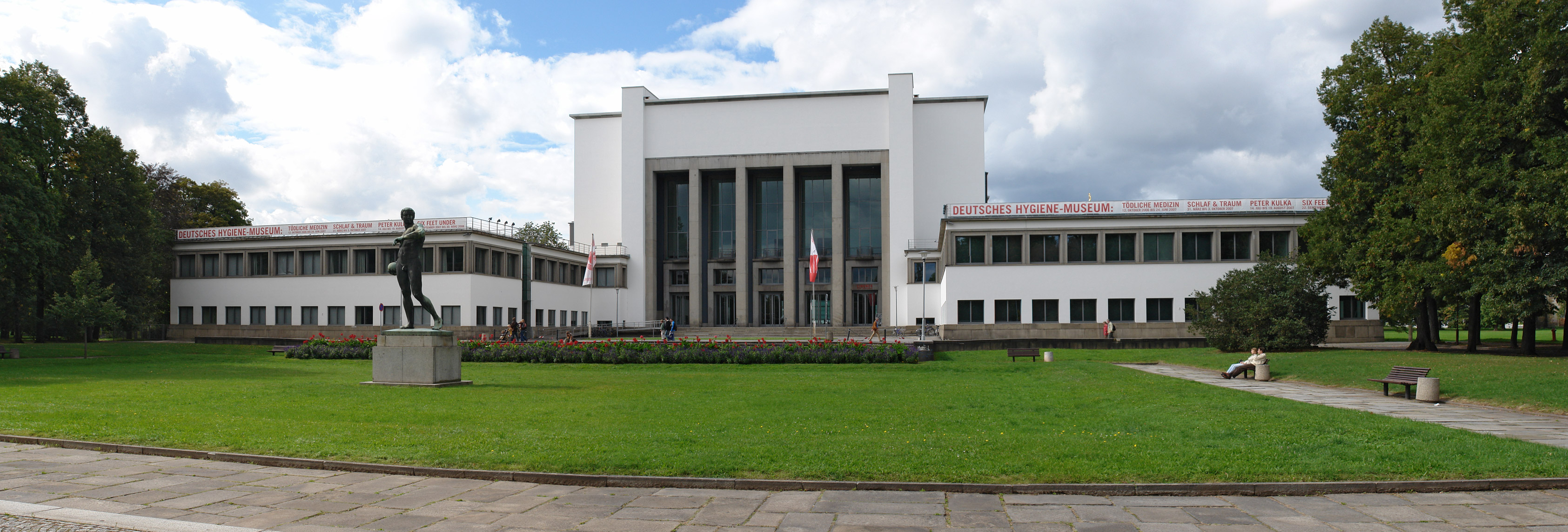 Deutsches Hygiene-Museum